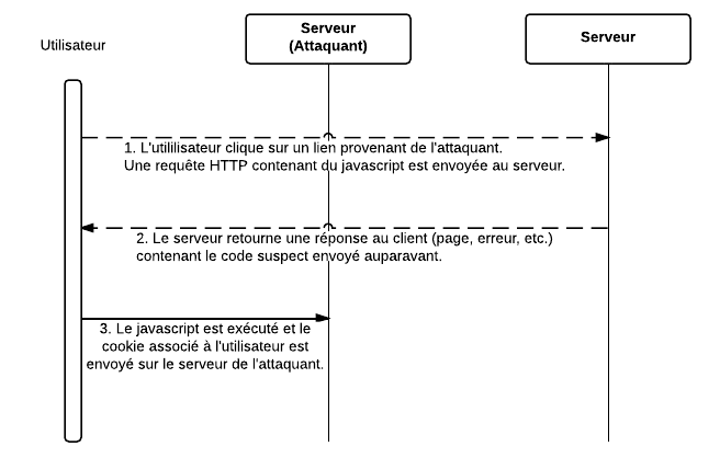 Schèma standard d'une attaque XSS